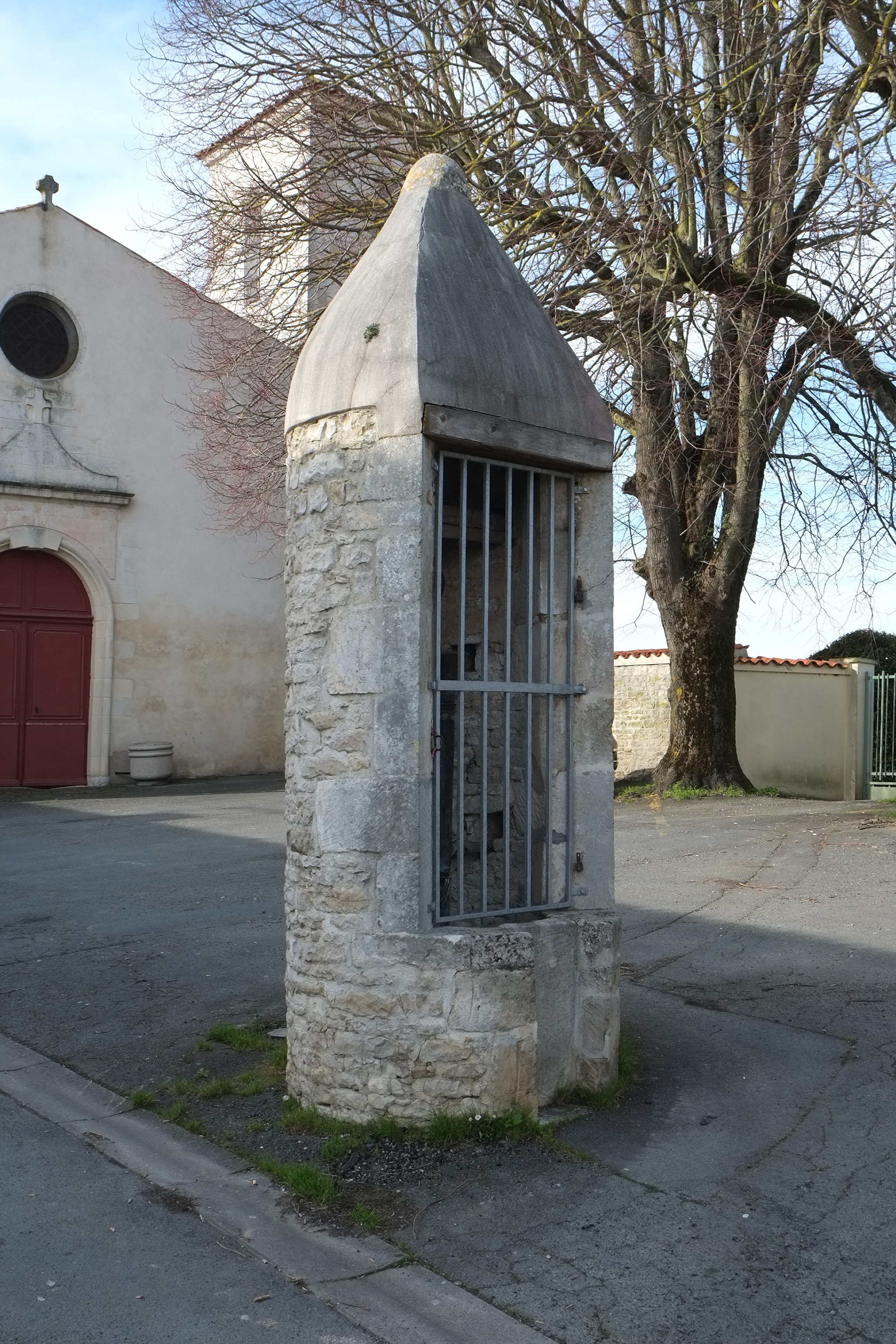 Vieux puit de l'église Villedoux Charente-Maritime France